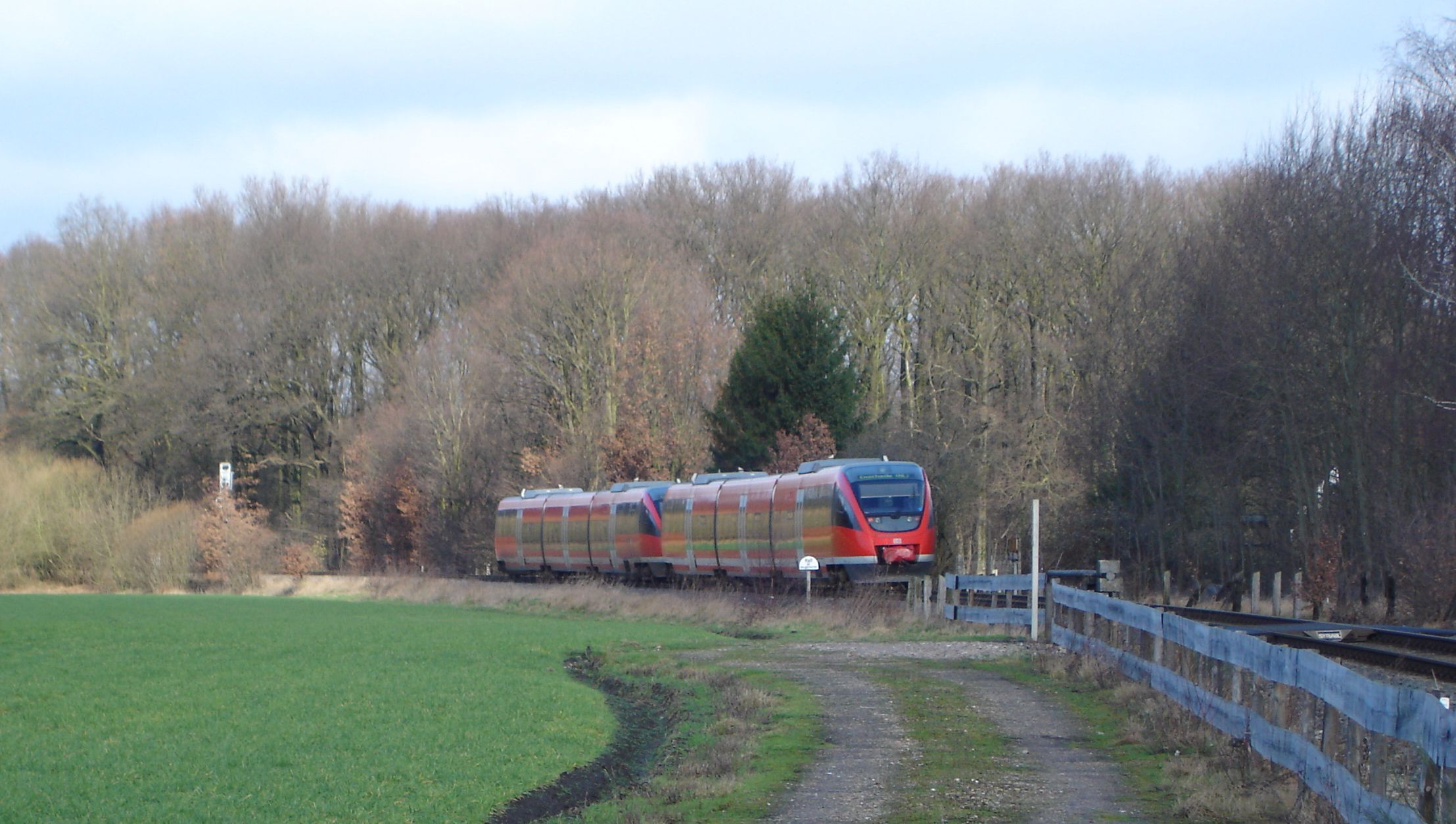 Die Euregiobahn Münster-Enschede in Richtung Enschede kurz hinter der Abzweigung am Nevinghoff in Münster, Deutschland